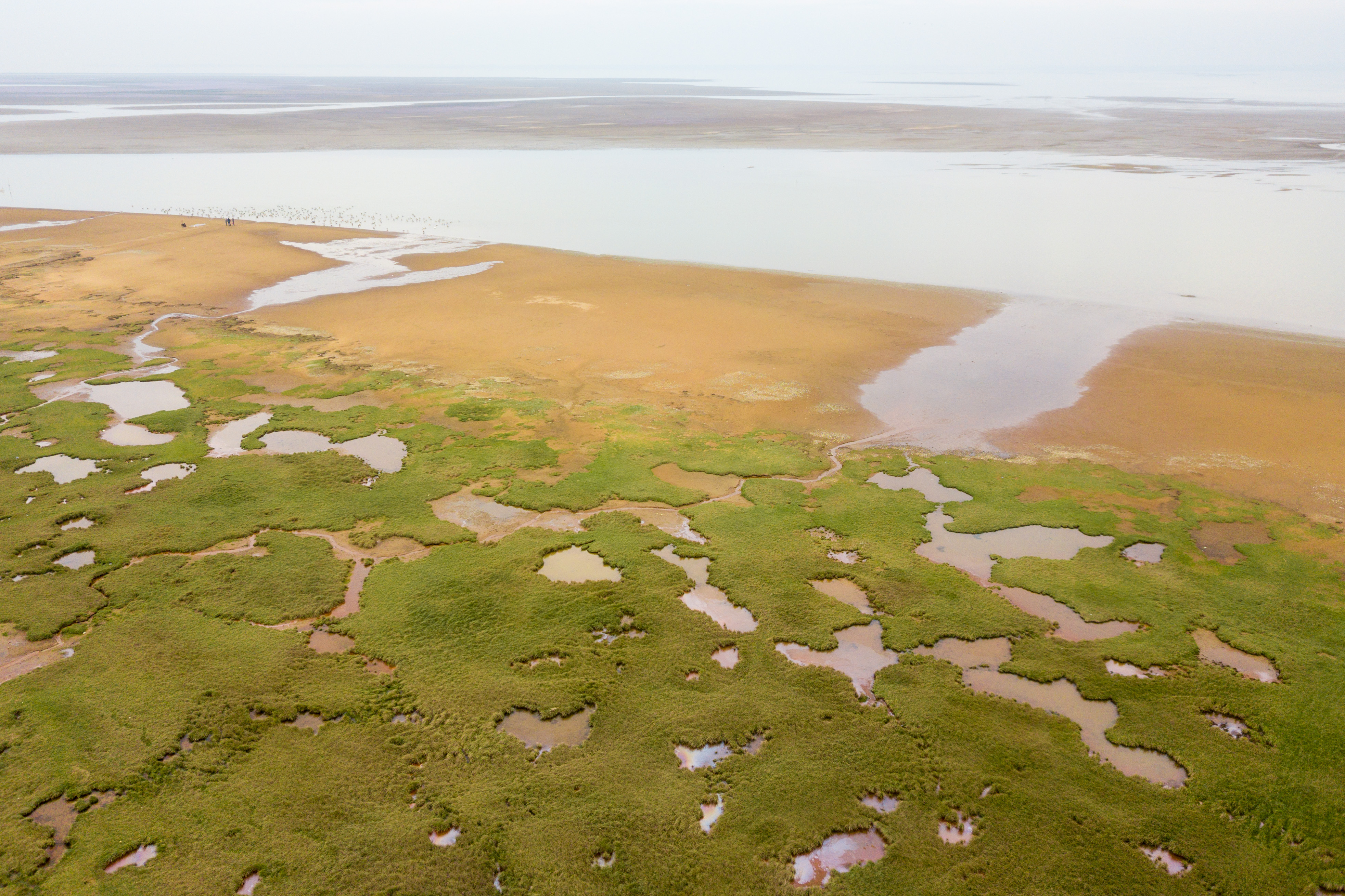 鄱阳白沙洲湿地公园